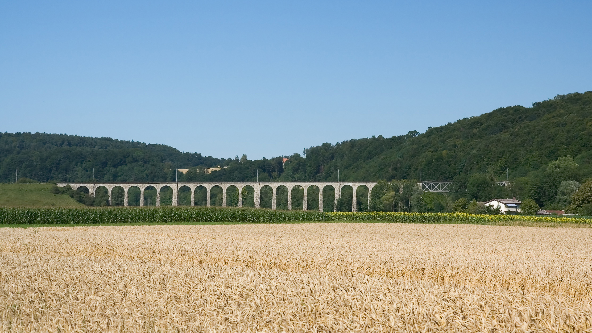 Links das Gleis der stillgelegten Sensetalbahn, hinten das Gümmenenviadukt der Bern–Neuenburg-Bahn